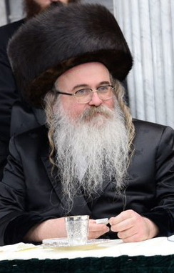 אדמו"ר מביאלא רמת אהרן